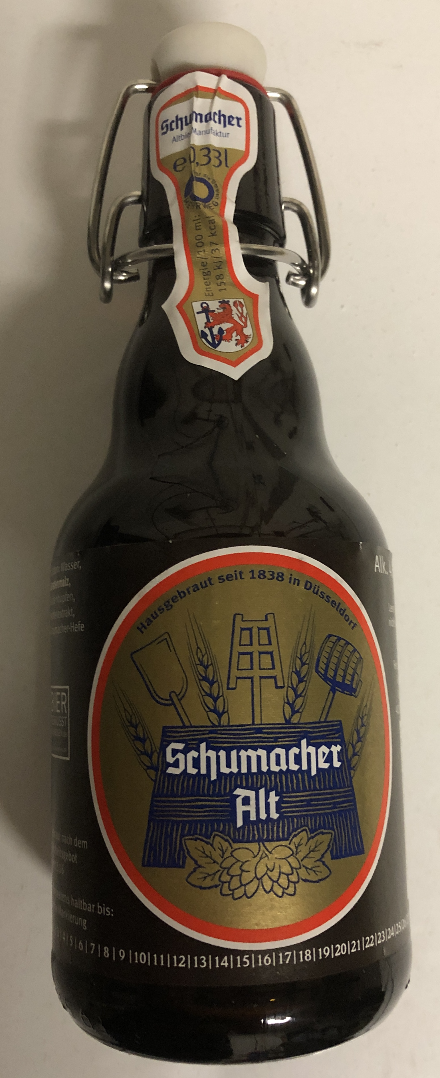 Seit Mai 2019 gibt es Schumacher Altbier auch in der 0,33 Liter Flasche